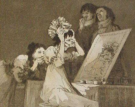 Detalle 1 del Capricho nº 55: Francisco Goya y Lucientes, Pintor de Goya, serie Los Caprichos